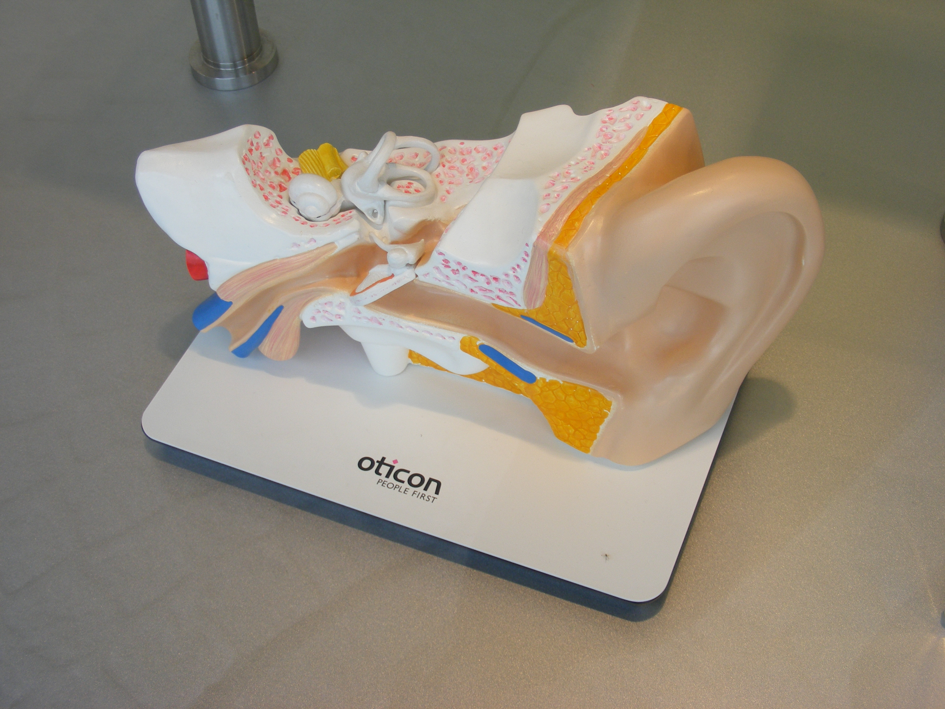 Modell eines menschlichen Ohres